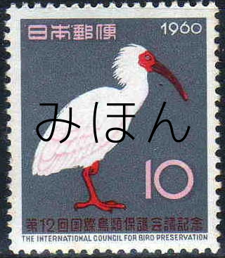 日本で開催された第12回国際鳥類保護会議を記念する朱鷺を描く切手。